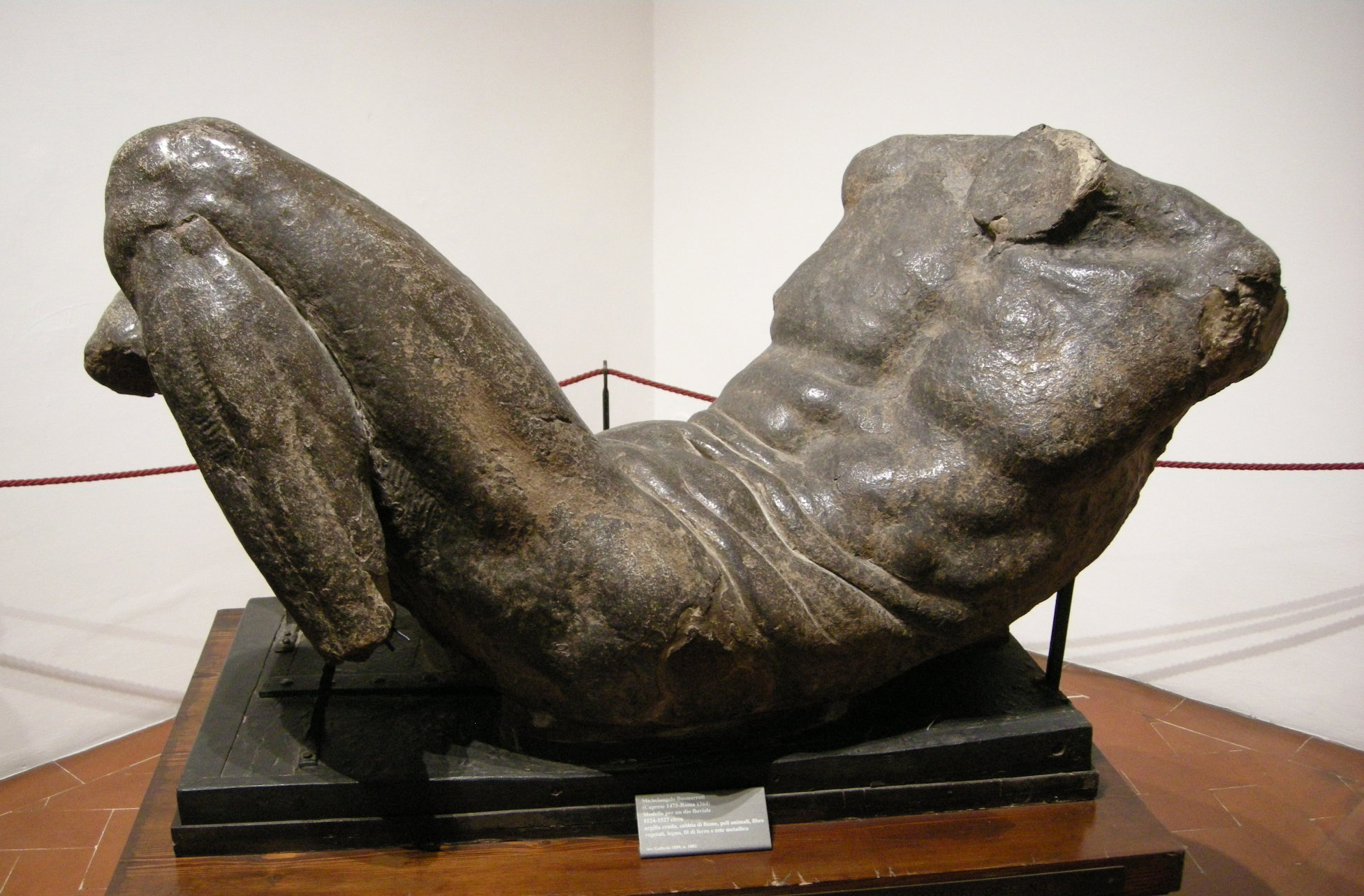 Michelangelo, modello per una divinità fluviale